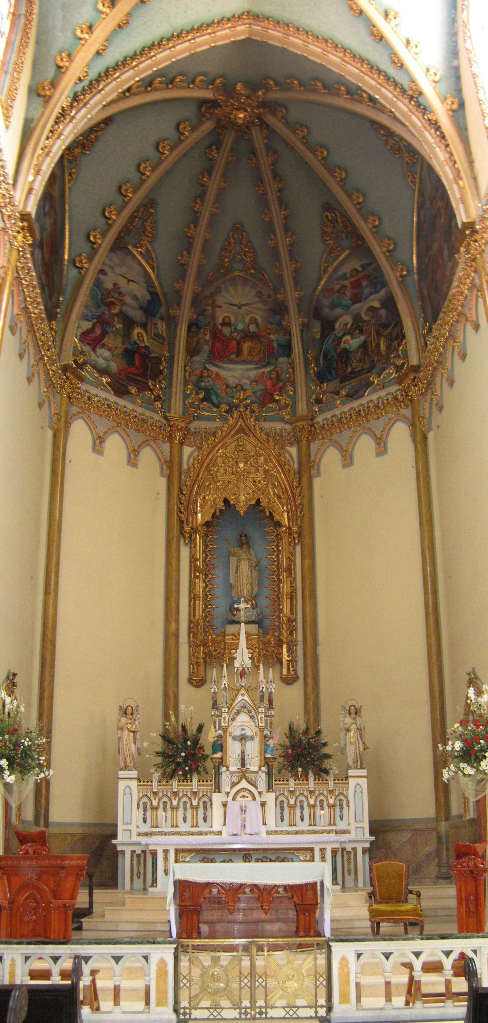 Iglesia de Nuestra Señora del Rosario del municipio de Donmatías, Antioquia, Colombia